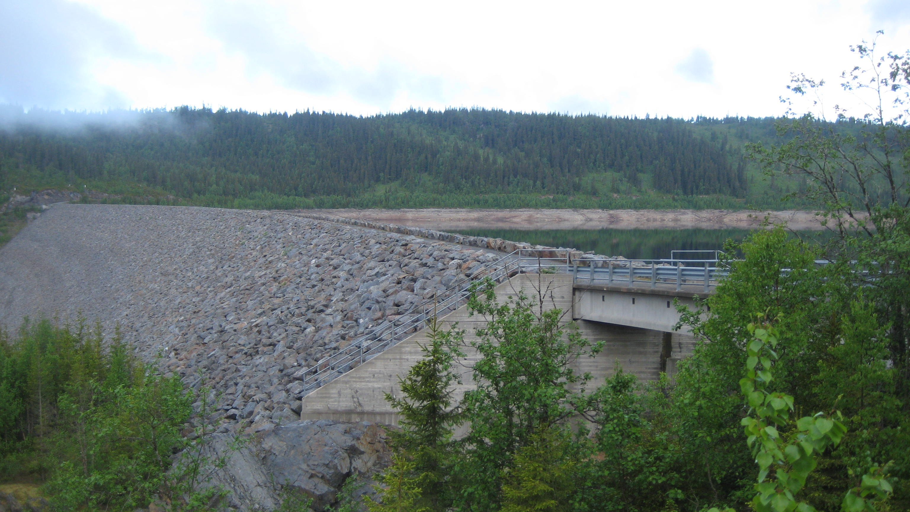 Dokkfløydammen i Torpa